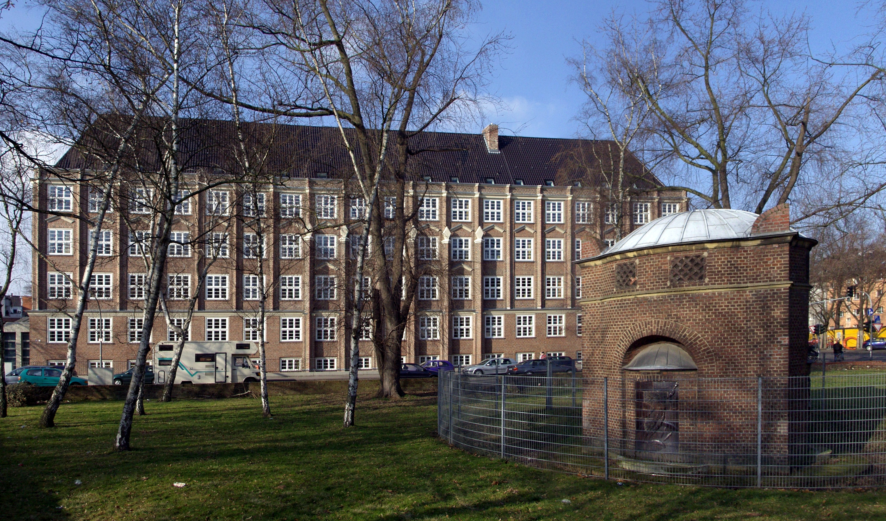 Theodor-Heuss-Realschule in Köln-Sülz. Architekt: Hubert Ritter. Im Vordergrund rechts ein altes Transformator-Häuschen mit Keramik-Reliefs von Erwin Holler.